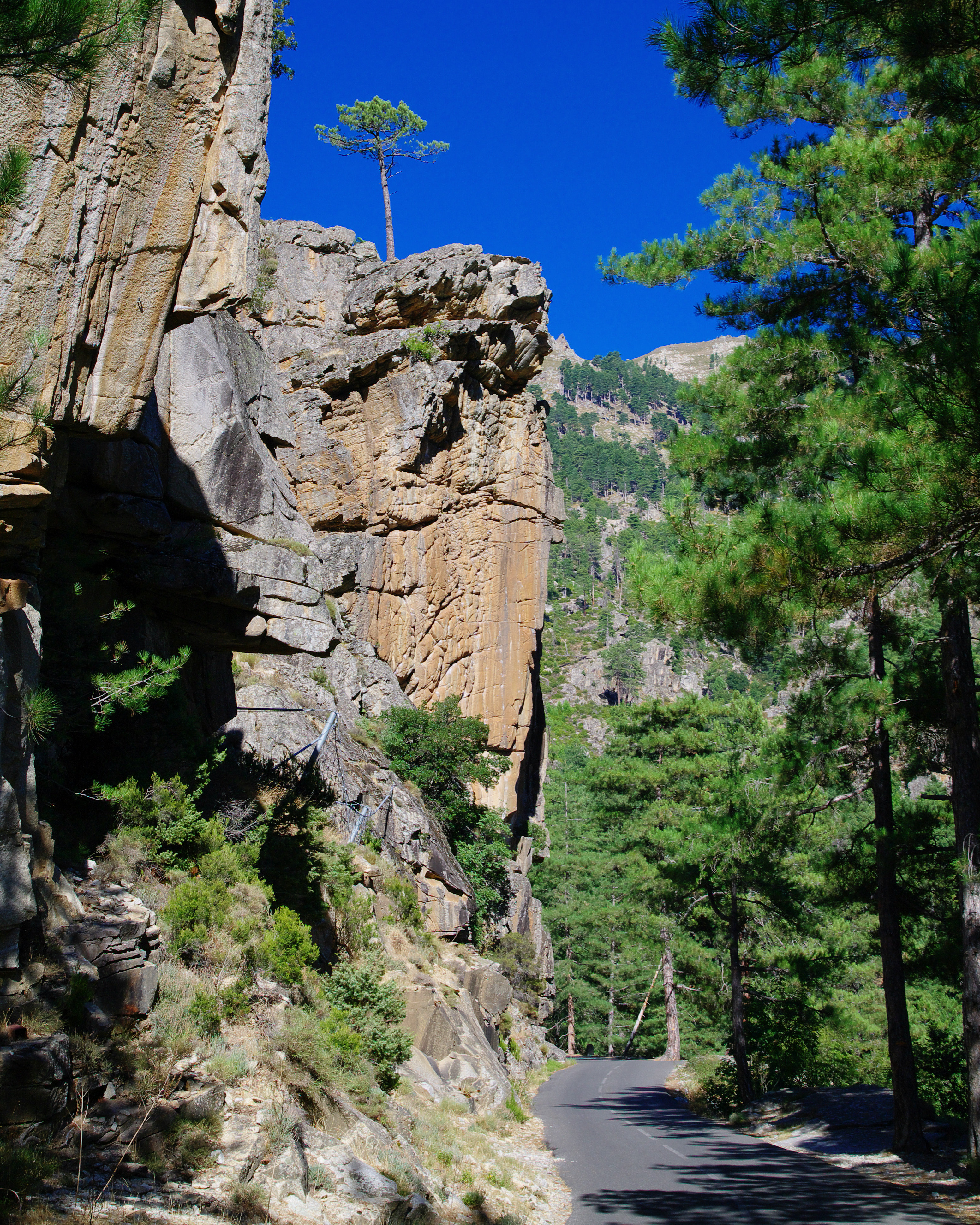 Pinus nigra und Pinus pinaster, Korsika, Corte, im Restonica-Tal.